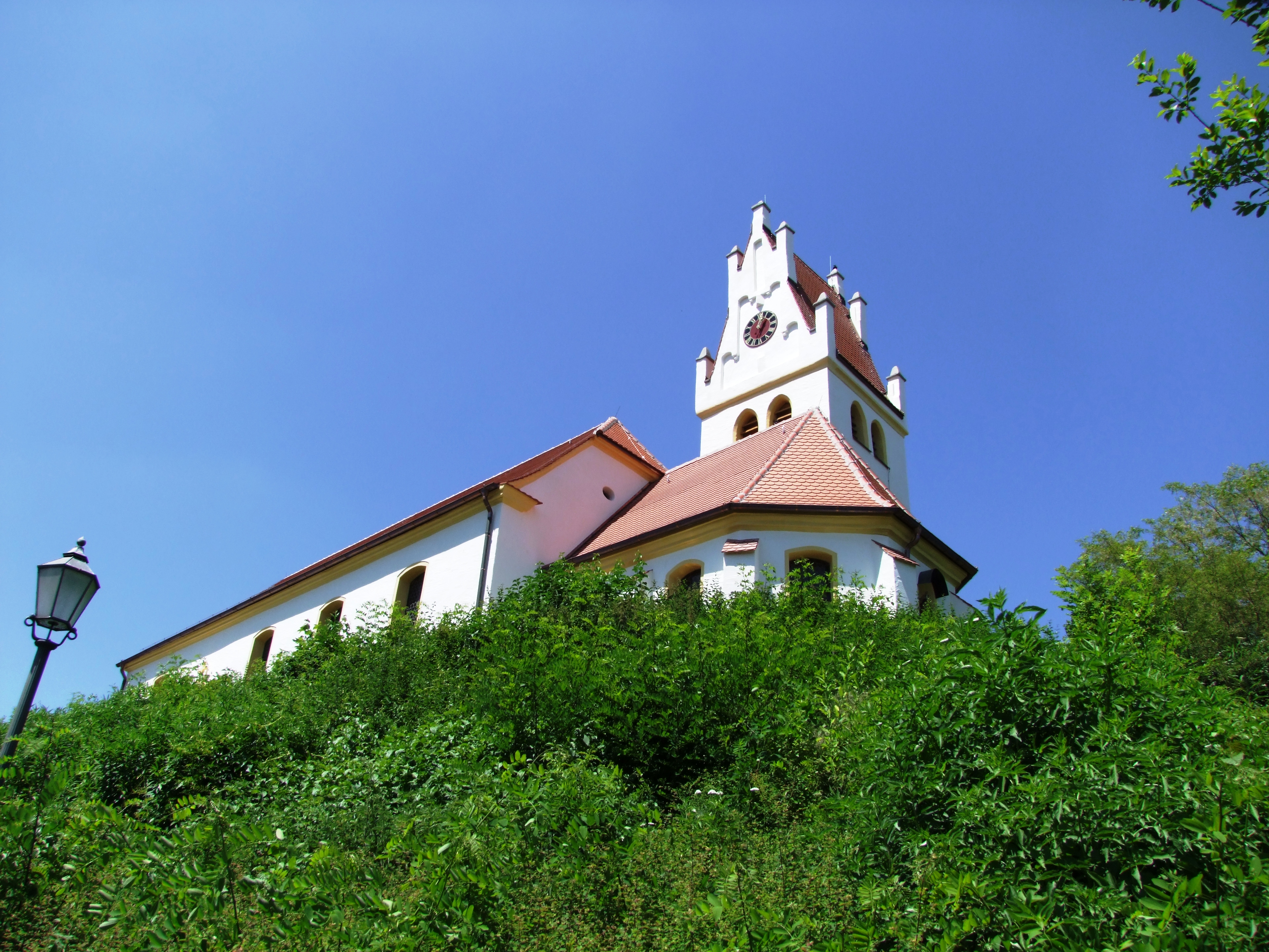 St. Agatha in Illerrieden.